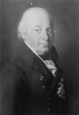 Kasztelan chełmski Wojciech Poletyłło